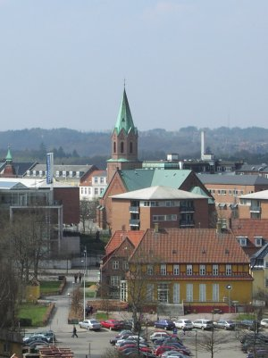 Silkeborg Kirke, set fra Århusbakken